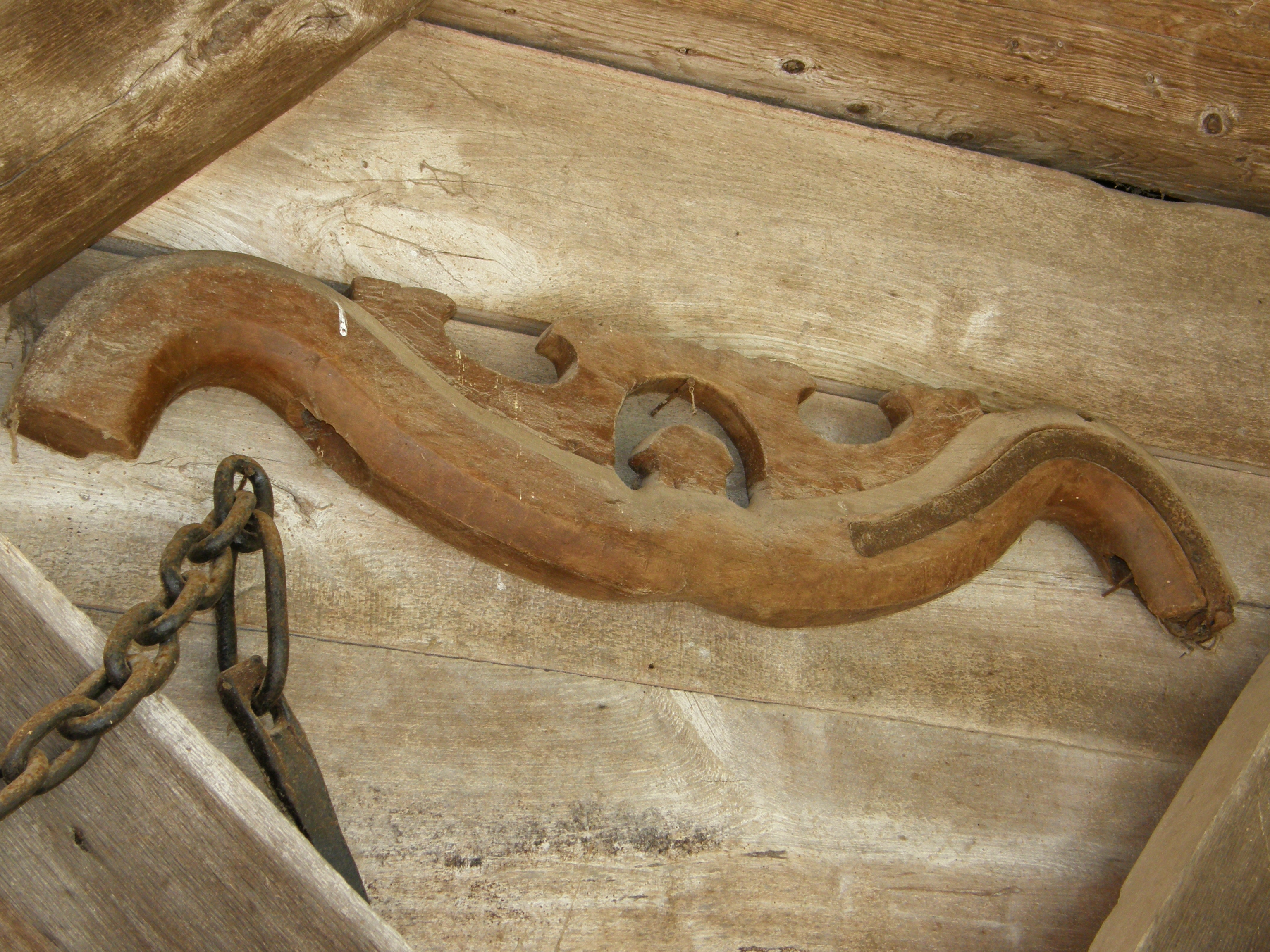 Telenge, Krka, Slovenia